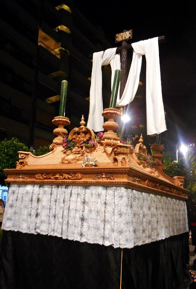 Santa Vera Cruz